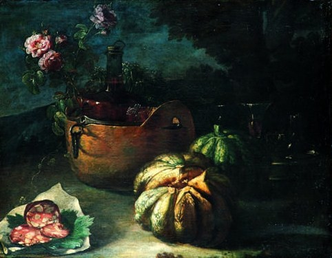 Bodegón con cuenco de bronce, botella, vasos, flores, salami y melón. Colección particular